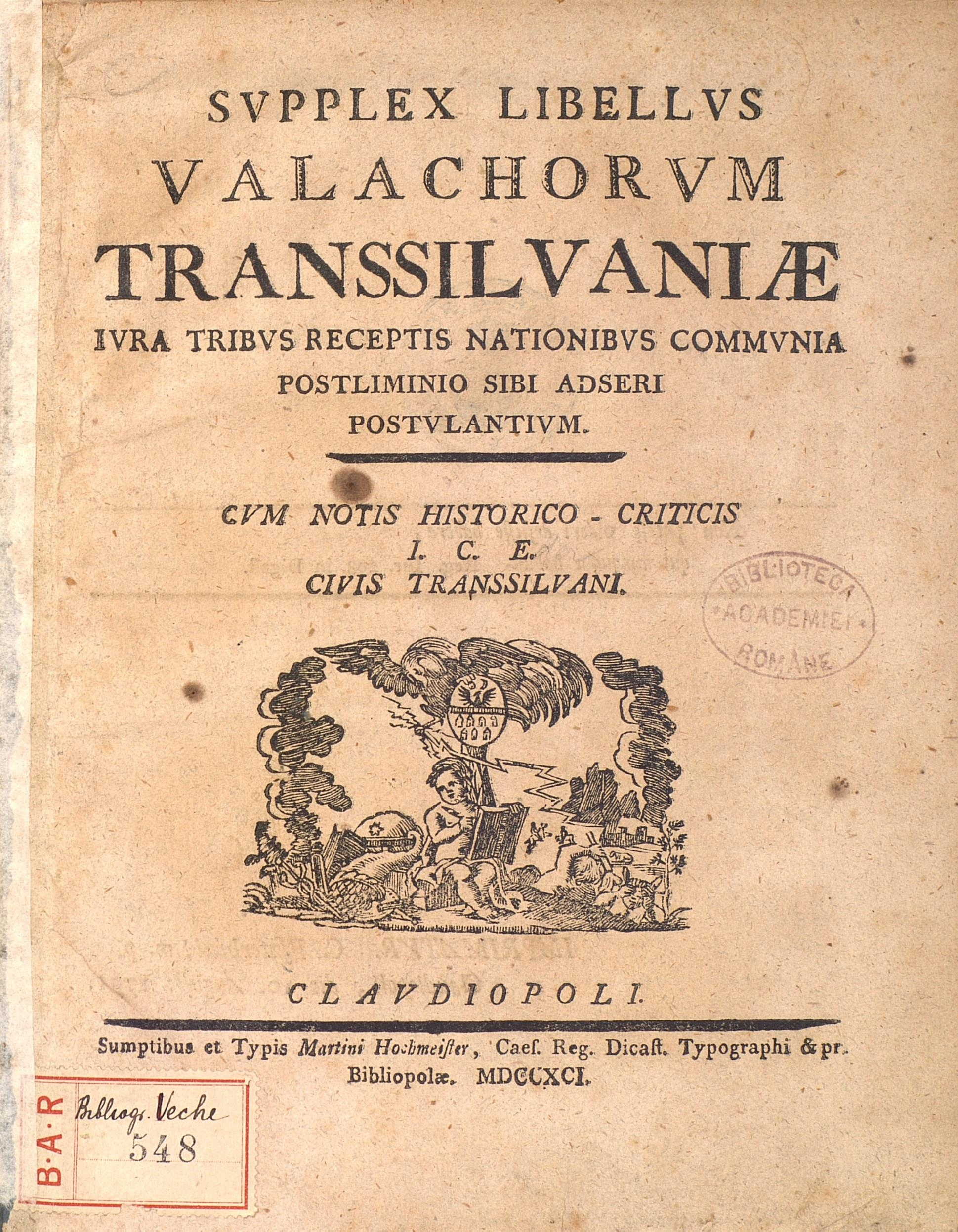 Pagina de titlu a petiției „Supplex Libellus Valachorum Transsilvaniae”, Cluj, 1791.